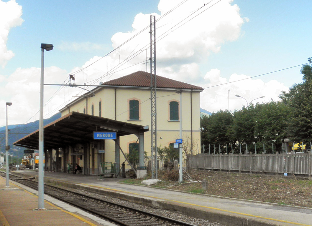 Stazione ferroviaria di Merone